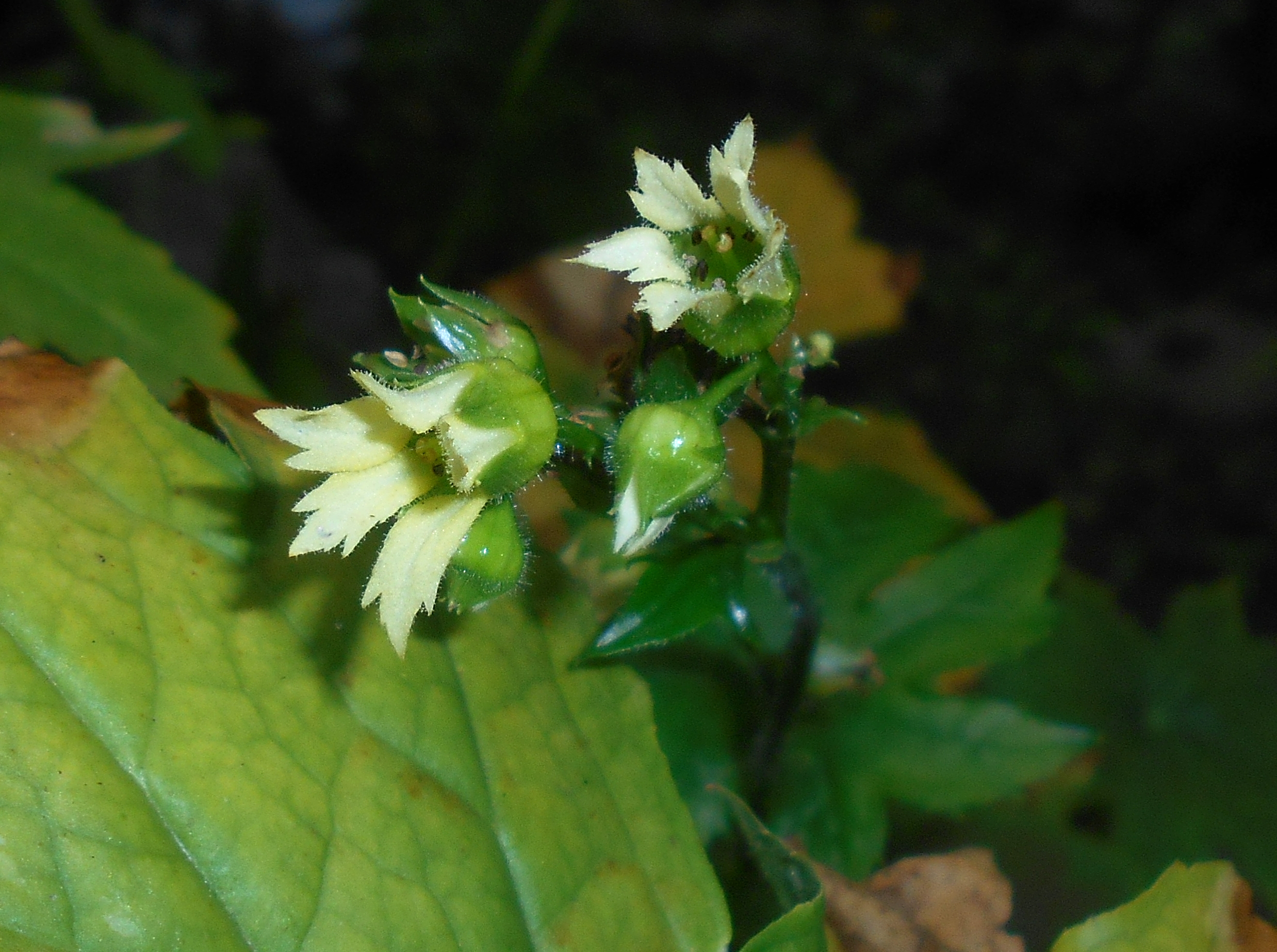 Peltoboykinia watanabei, Ogród Botaniczny UMCS w Lublinie.